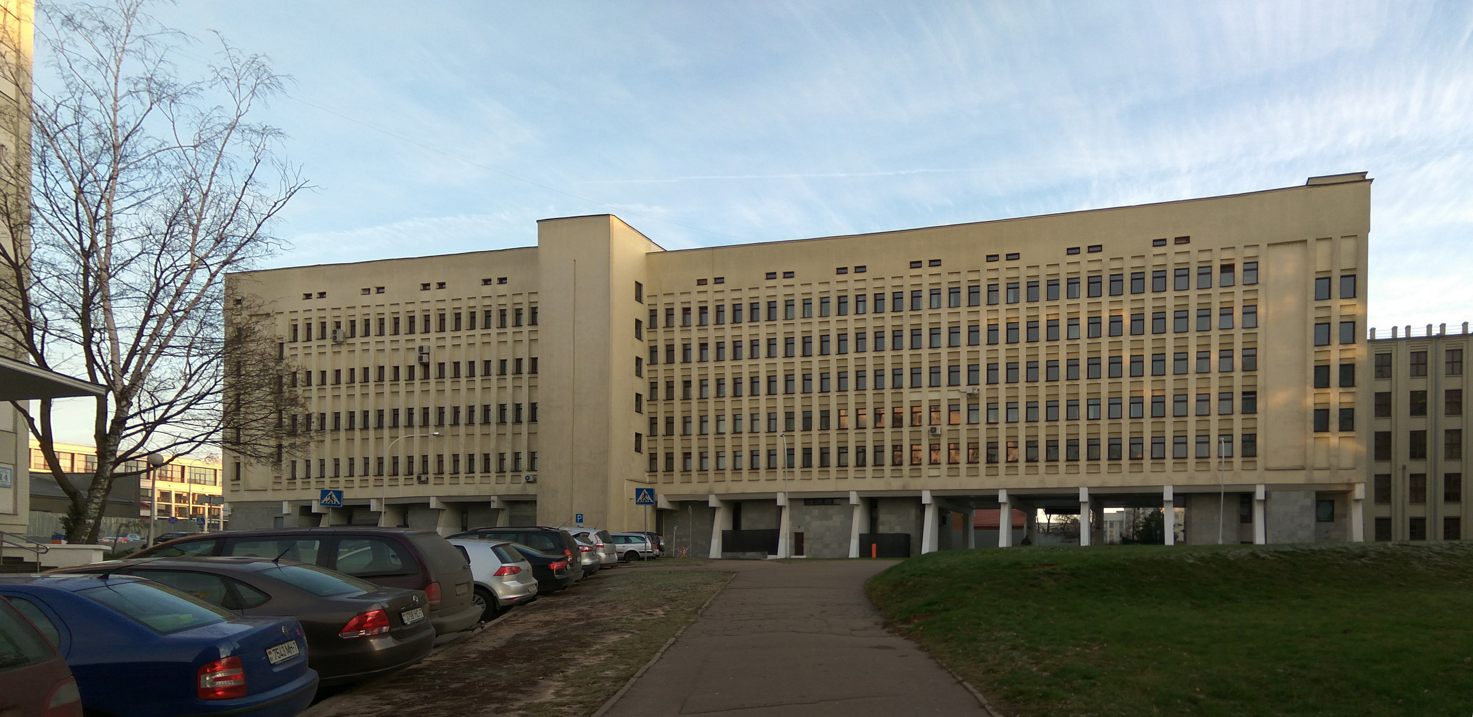 Дзяржаўны вылічальны цэнтр Дзяржплана БССР